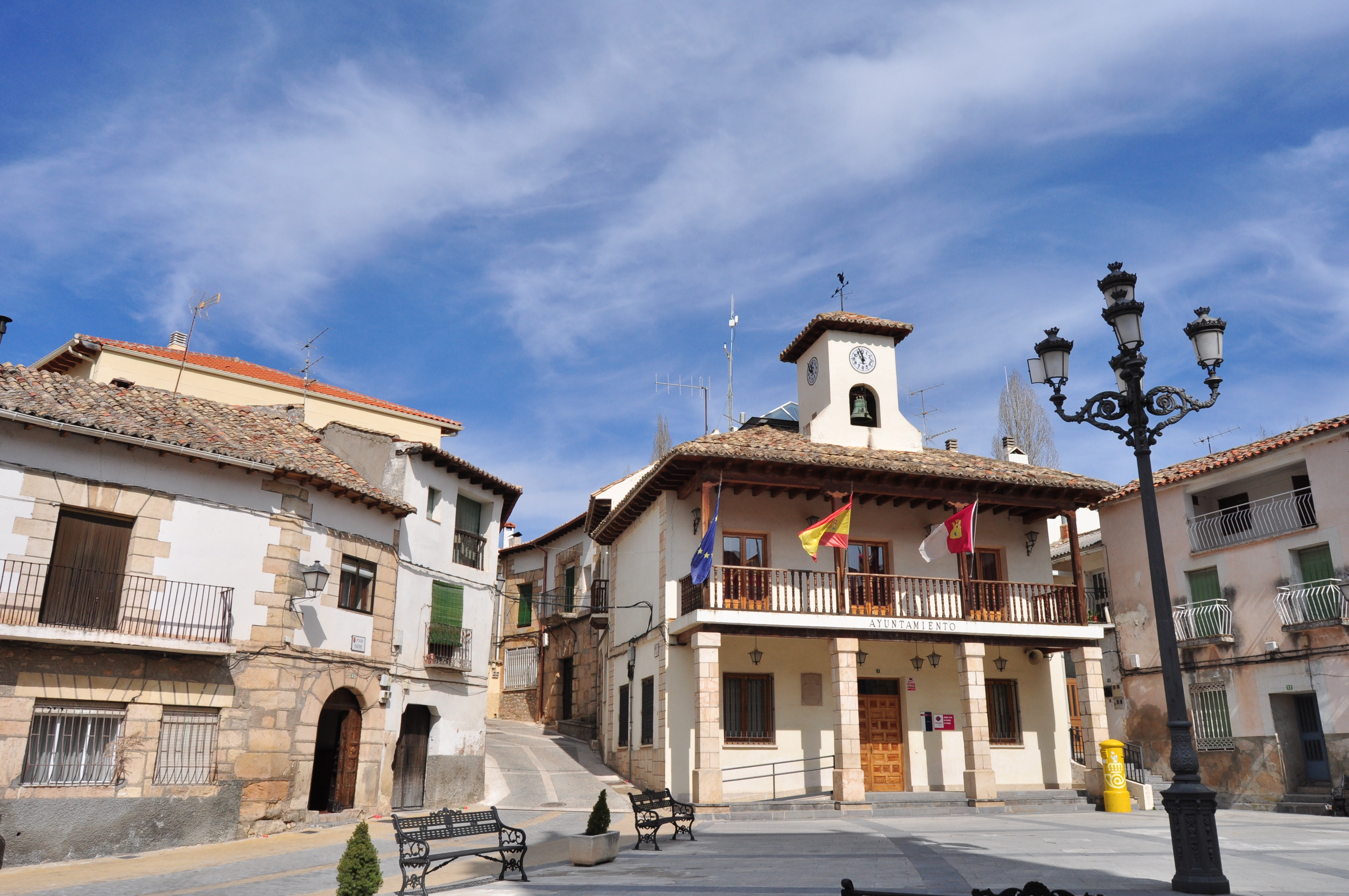 Trillo - 009